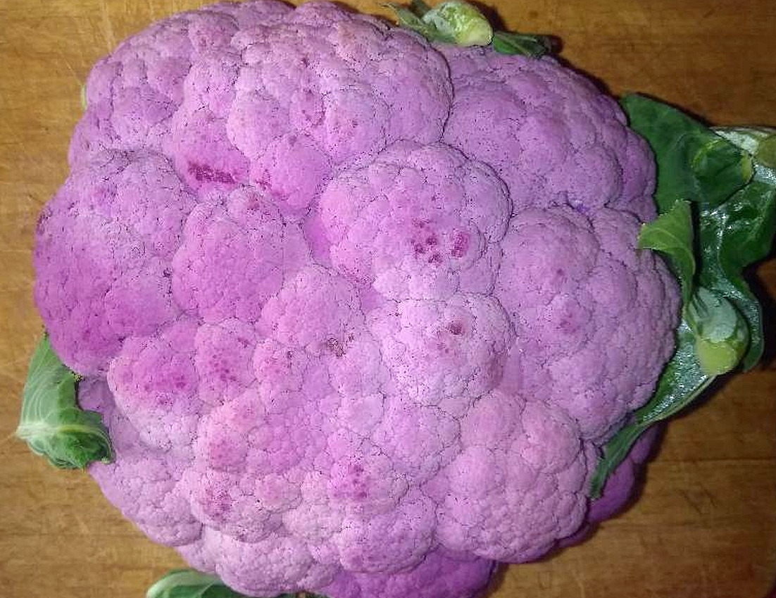 Cavolfiore violetto acquistato in Italia